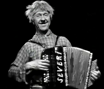 Эса Пакаринен с аккордеоном.